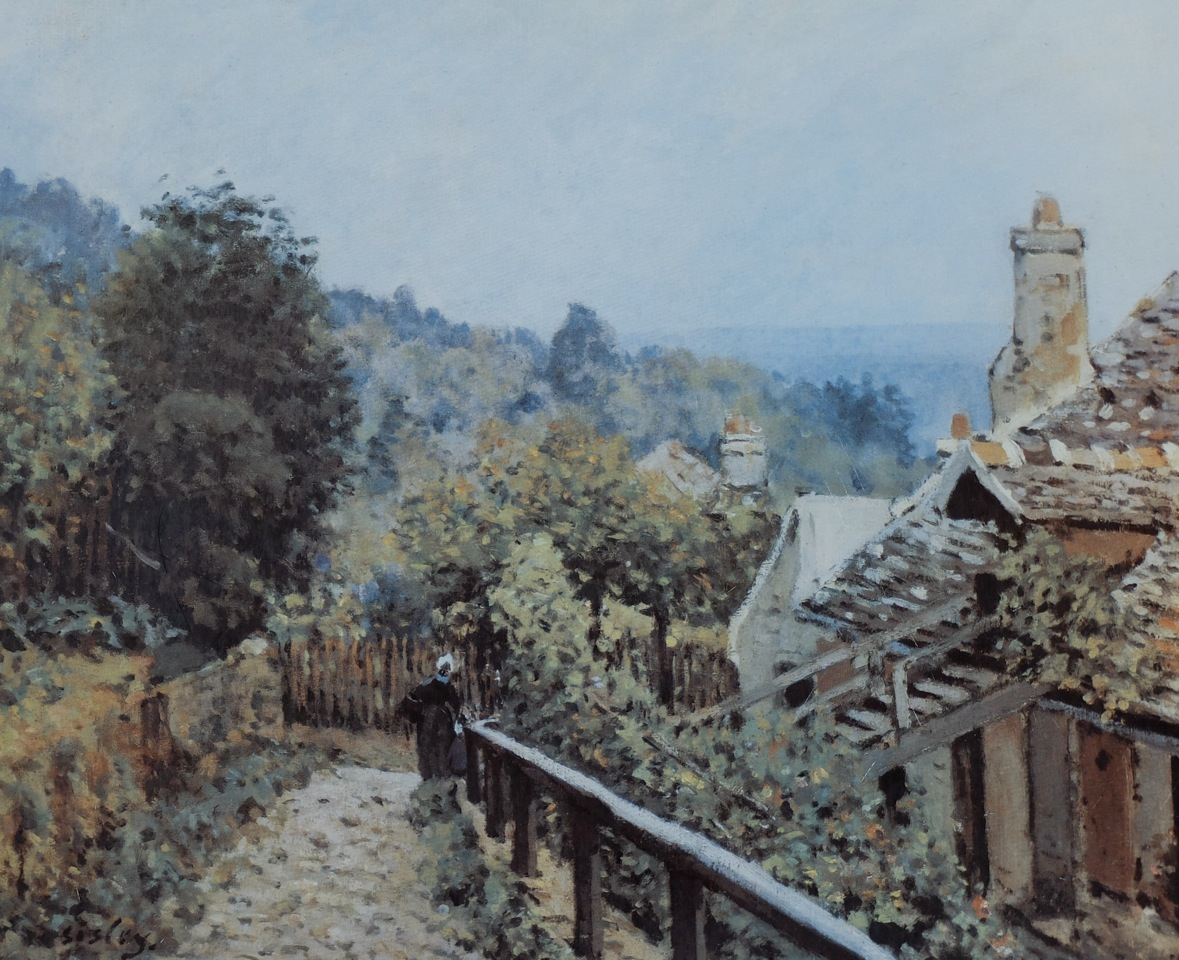 Louveciennes. Sentier de la Mi-côte, ancien titre Hauteurs de Marly, ferme de mi-côte, aussi Louveciennes, hauteurs de Marly, vers 1873